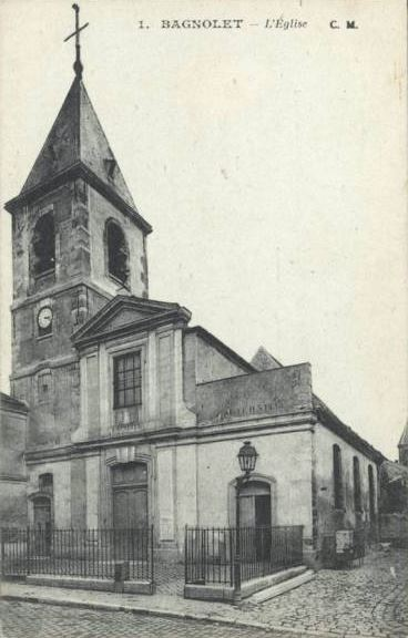 Bagnolet: Eglise Saint-Leu-Saint-Gilles